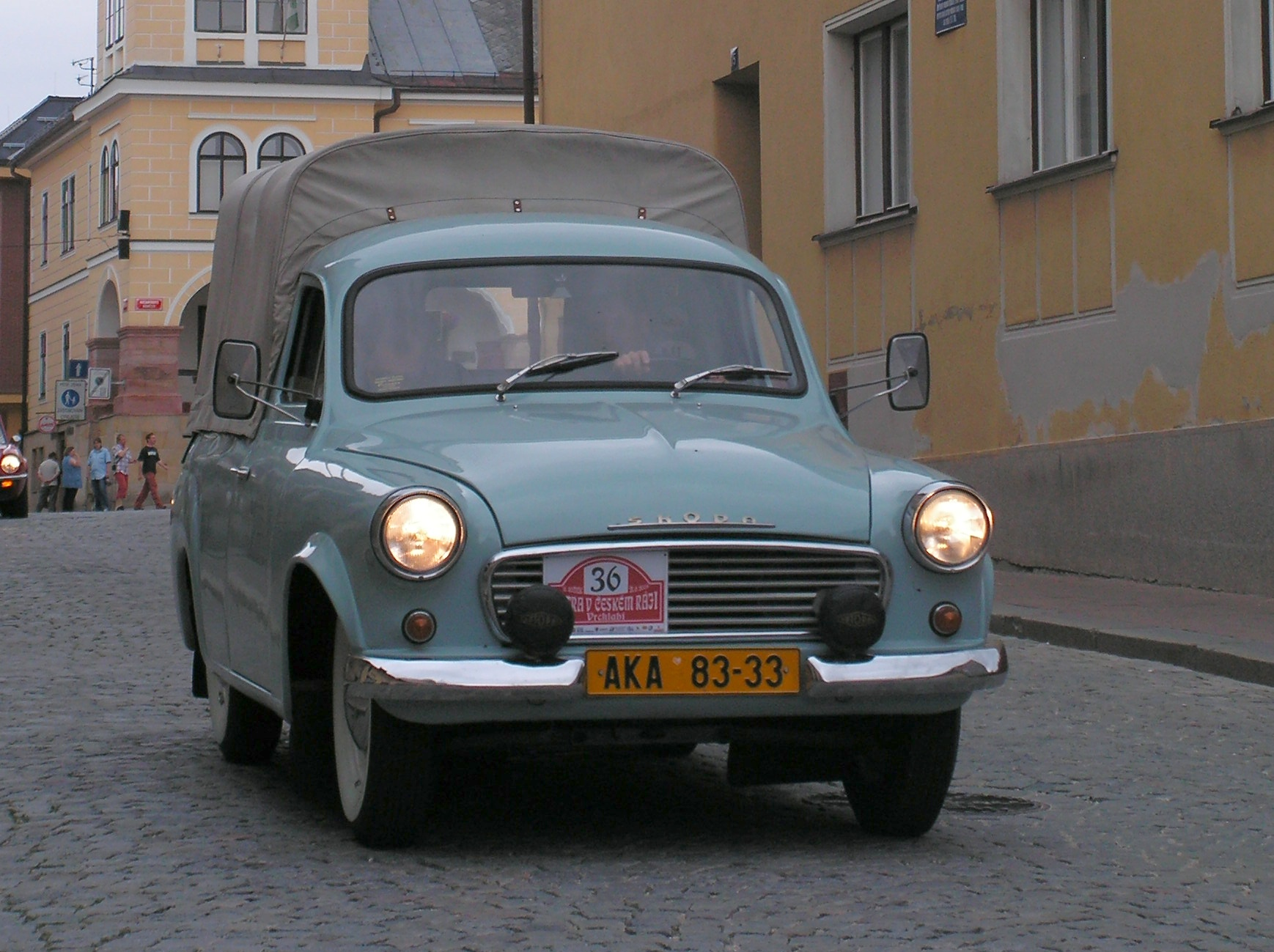 Historická Škoda 1202 na akci "Tatra v Českém ráji 2008"